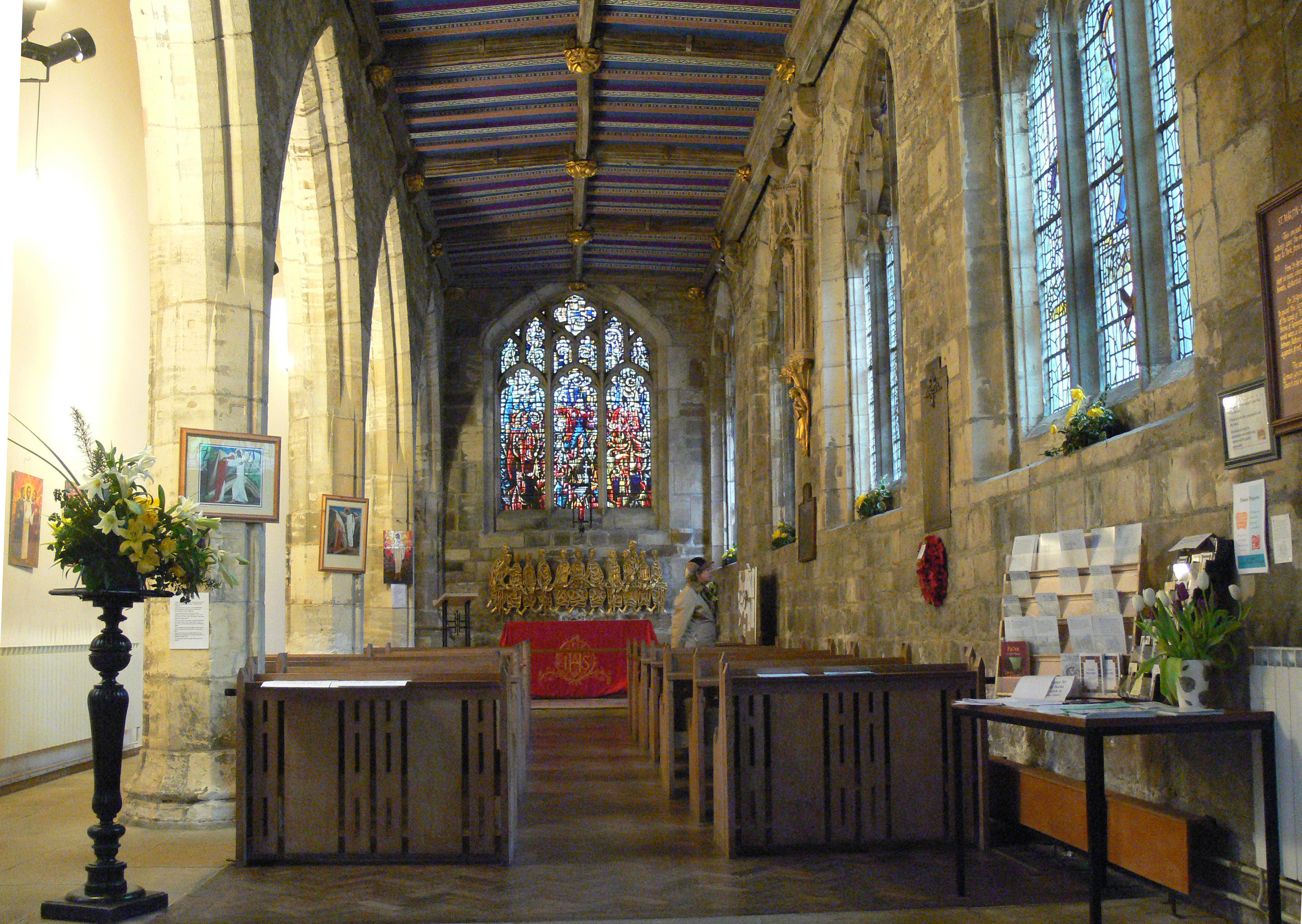 St. Martins-Kirche in York.